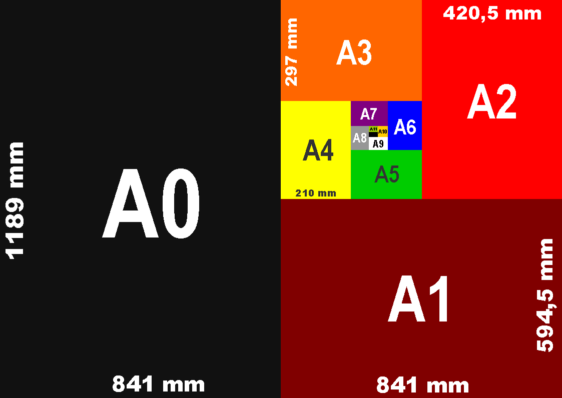 DIN A papierformaten